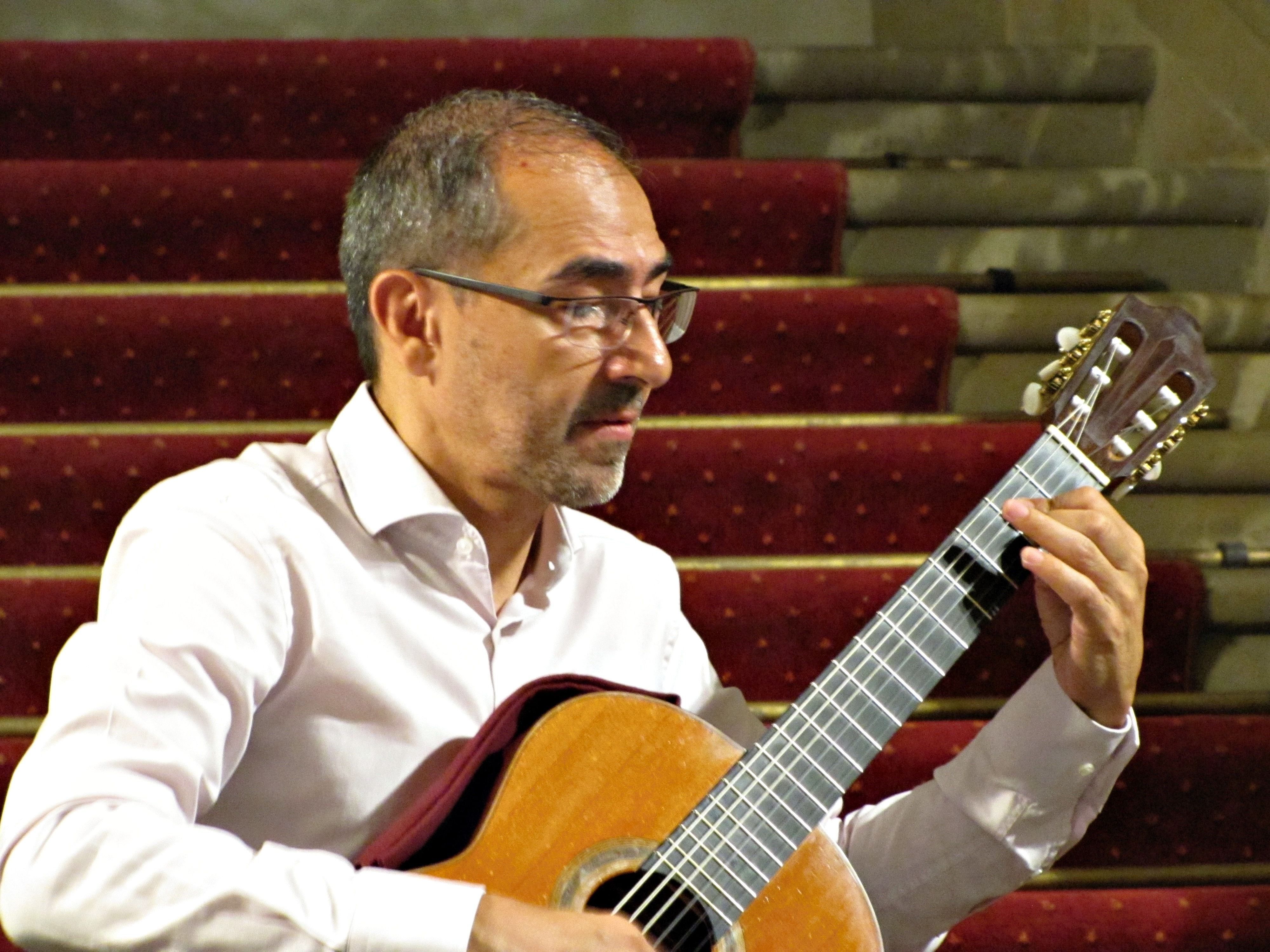 Argentinský kytarista Pablo Márquez na Kytarovém festivalu v Mikulově v České republice